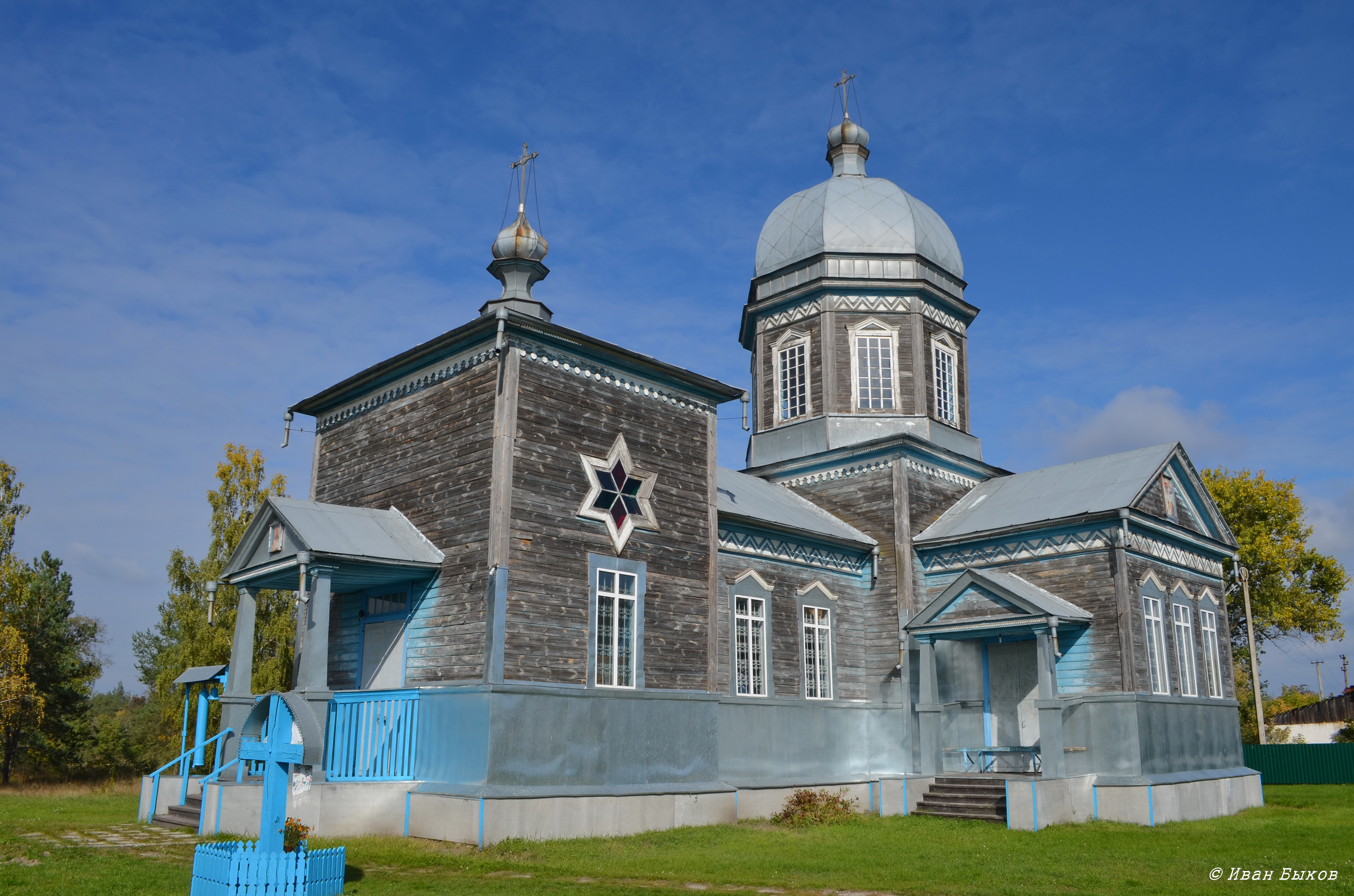 Миколаївська церква (дер.), село Гути, вул. Радянська, 37